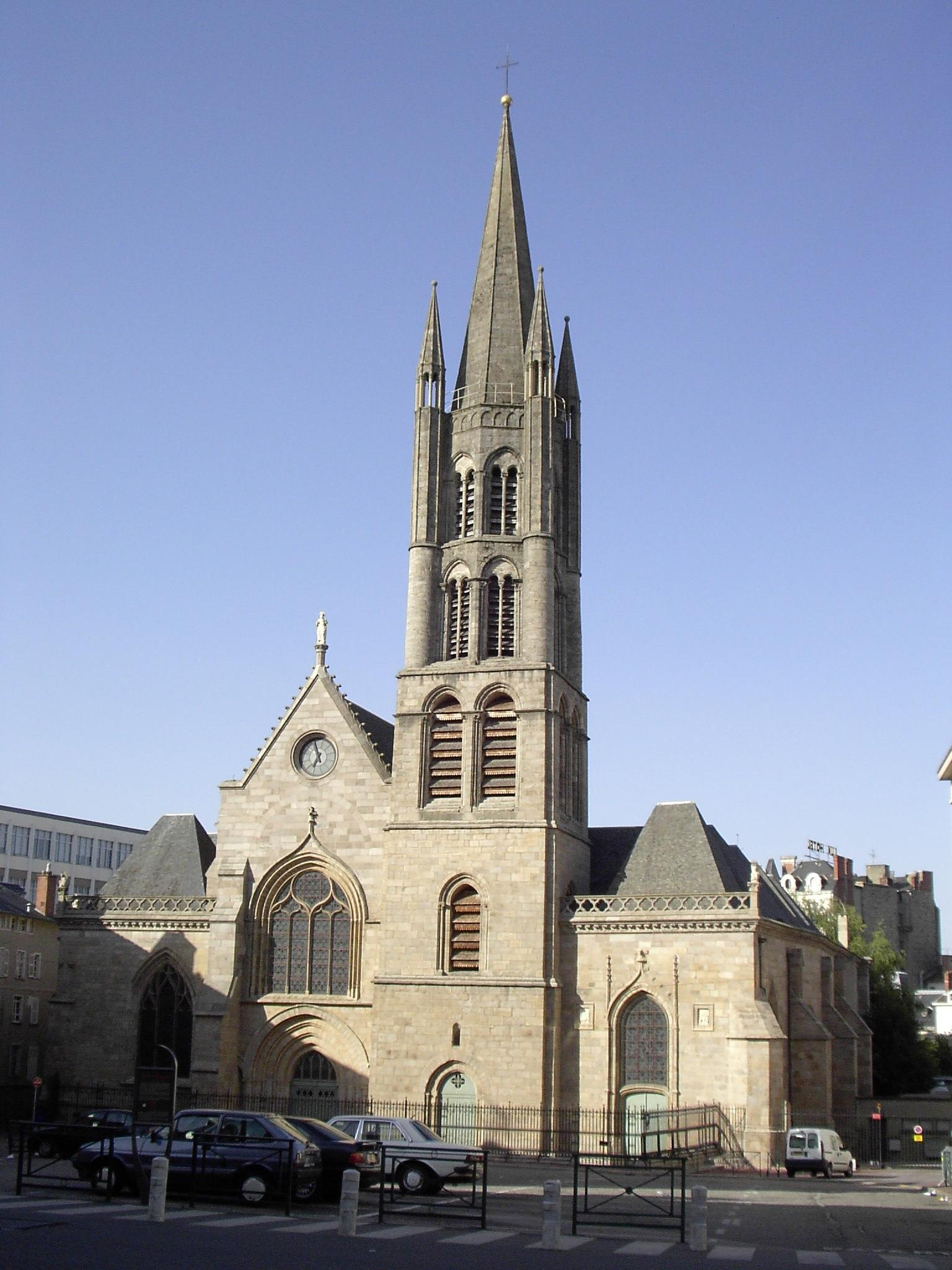 Eglise Saint-Pierre-du-Queyroix